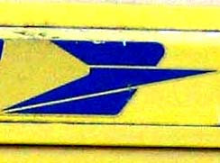 logo ptt de 1978